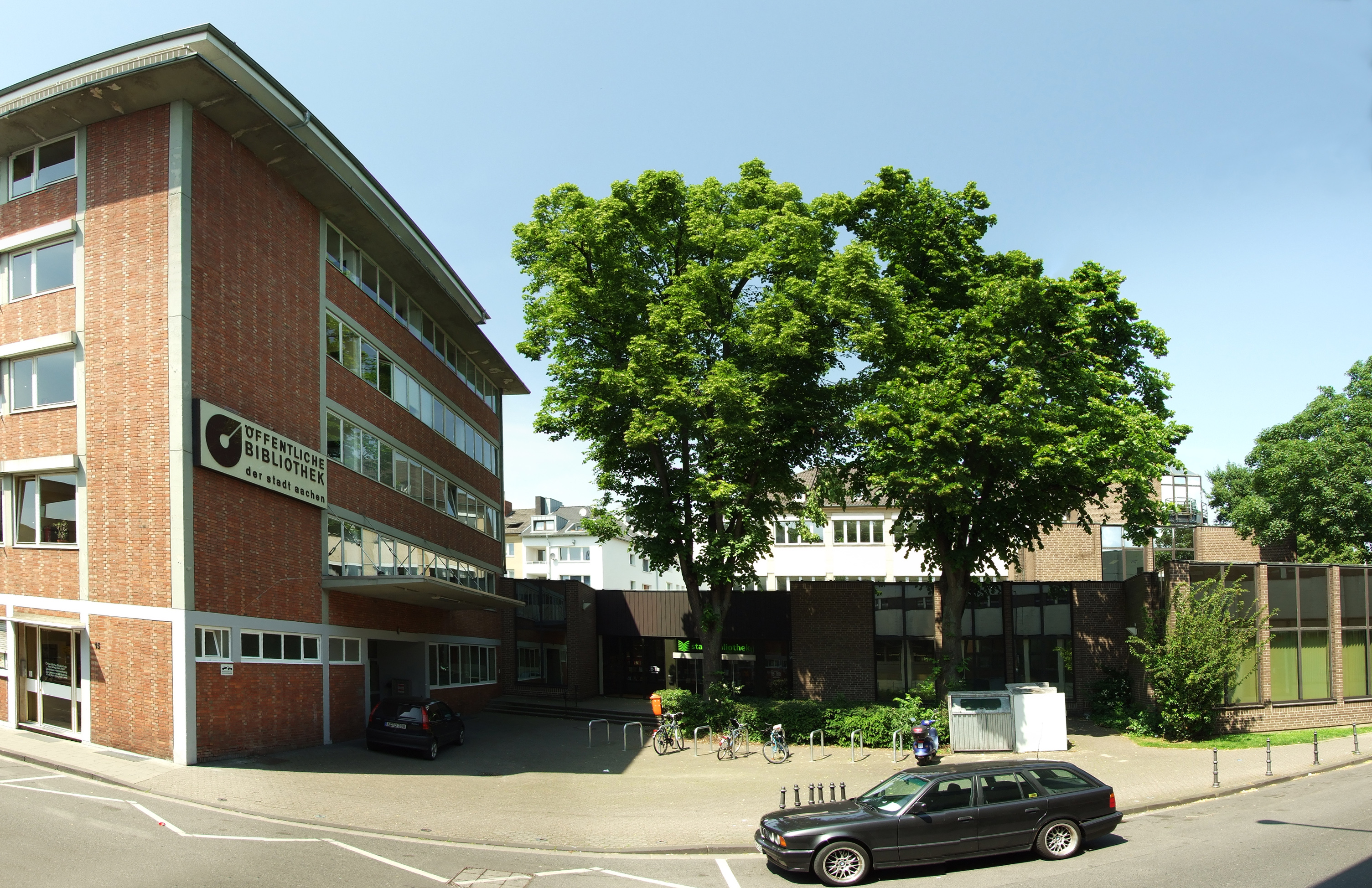 Stadtbibliothek Aachen